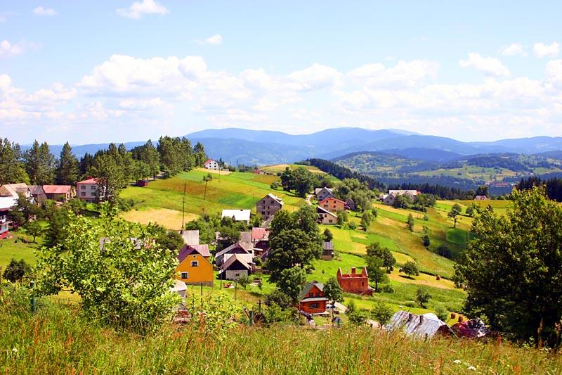 Widok z stoków Ochodzitej na przysiółek Pietraszyna. W tle Beskid Żywiecki.